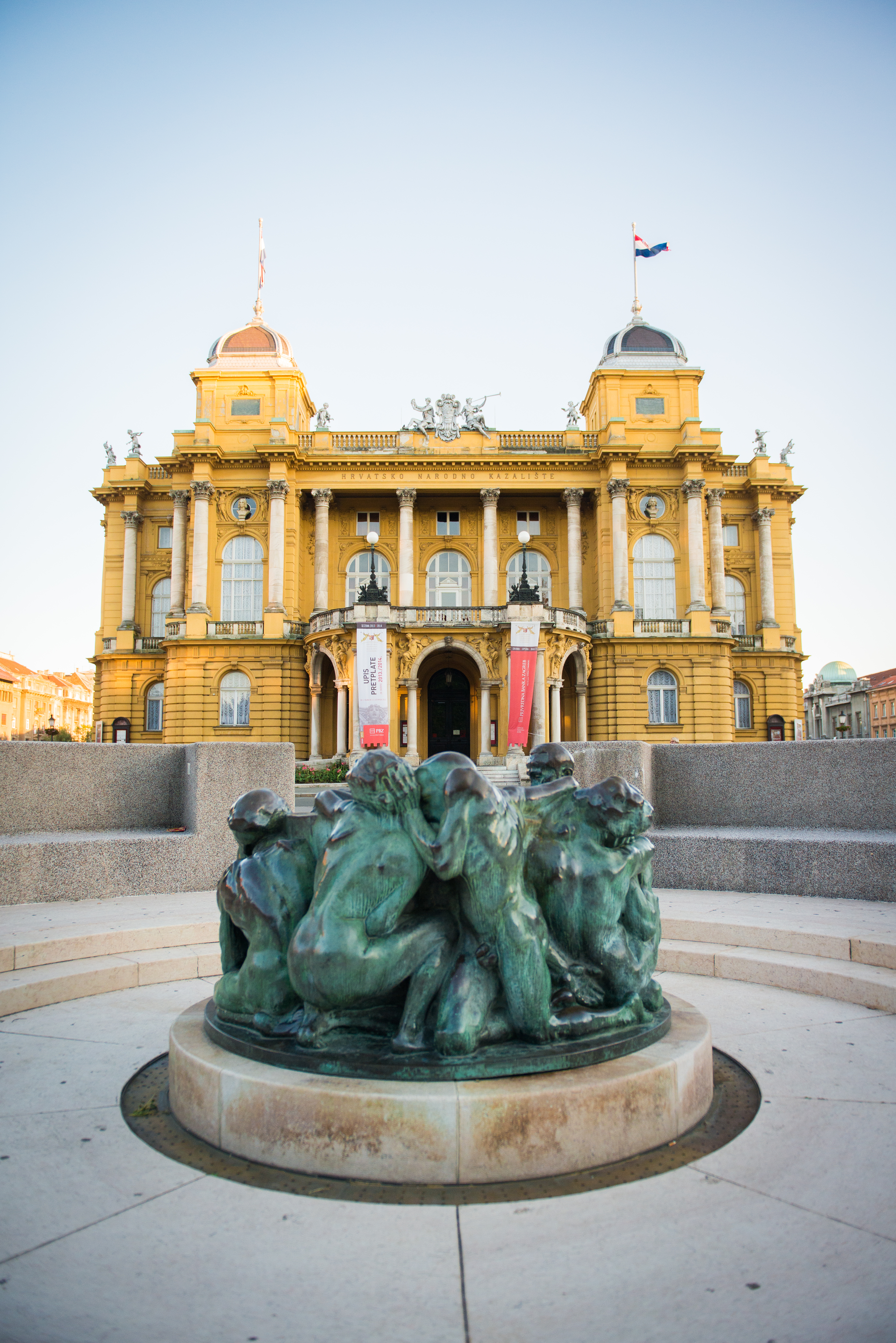 Zgrada Hrvatskog narodnog kazališta, Trg maršala Tita 15